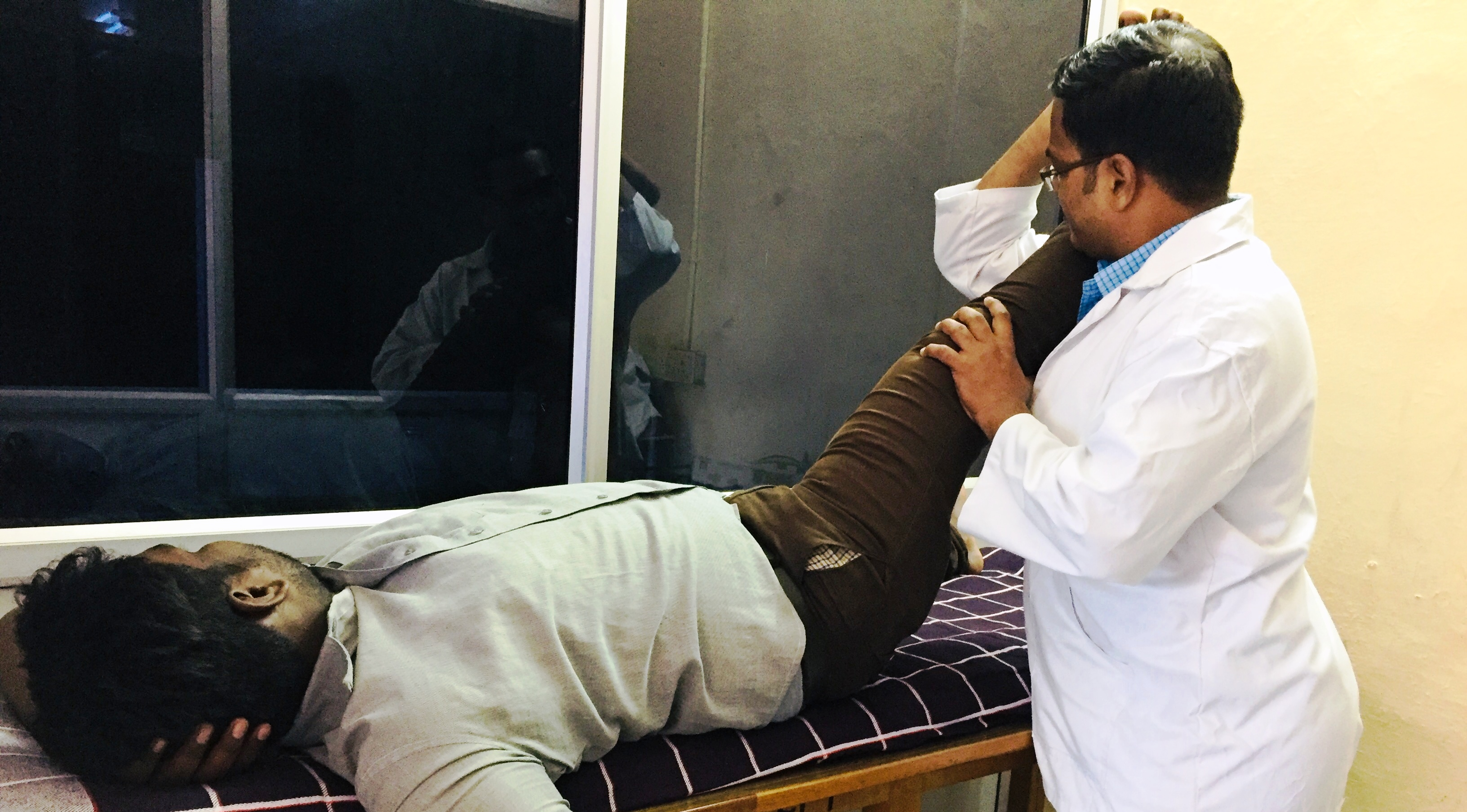 தசை நீட்சி உடற்பயிற்சி